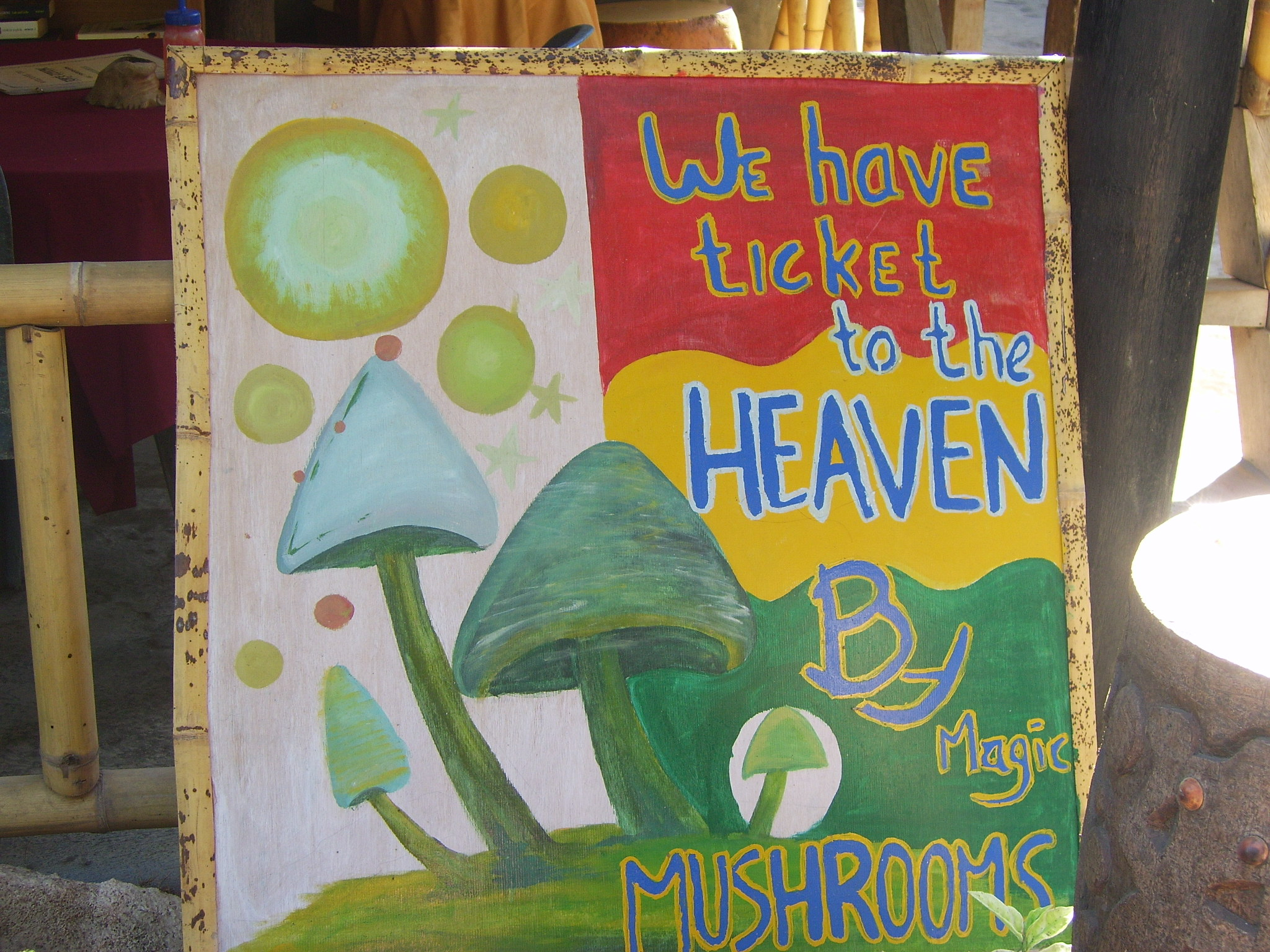 Reclamebord voor paddo's op Gili Trawangang (Indonesie)